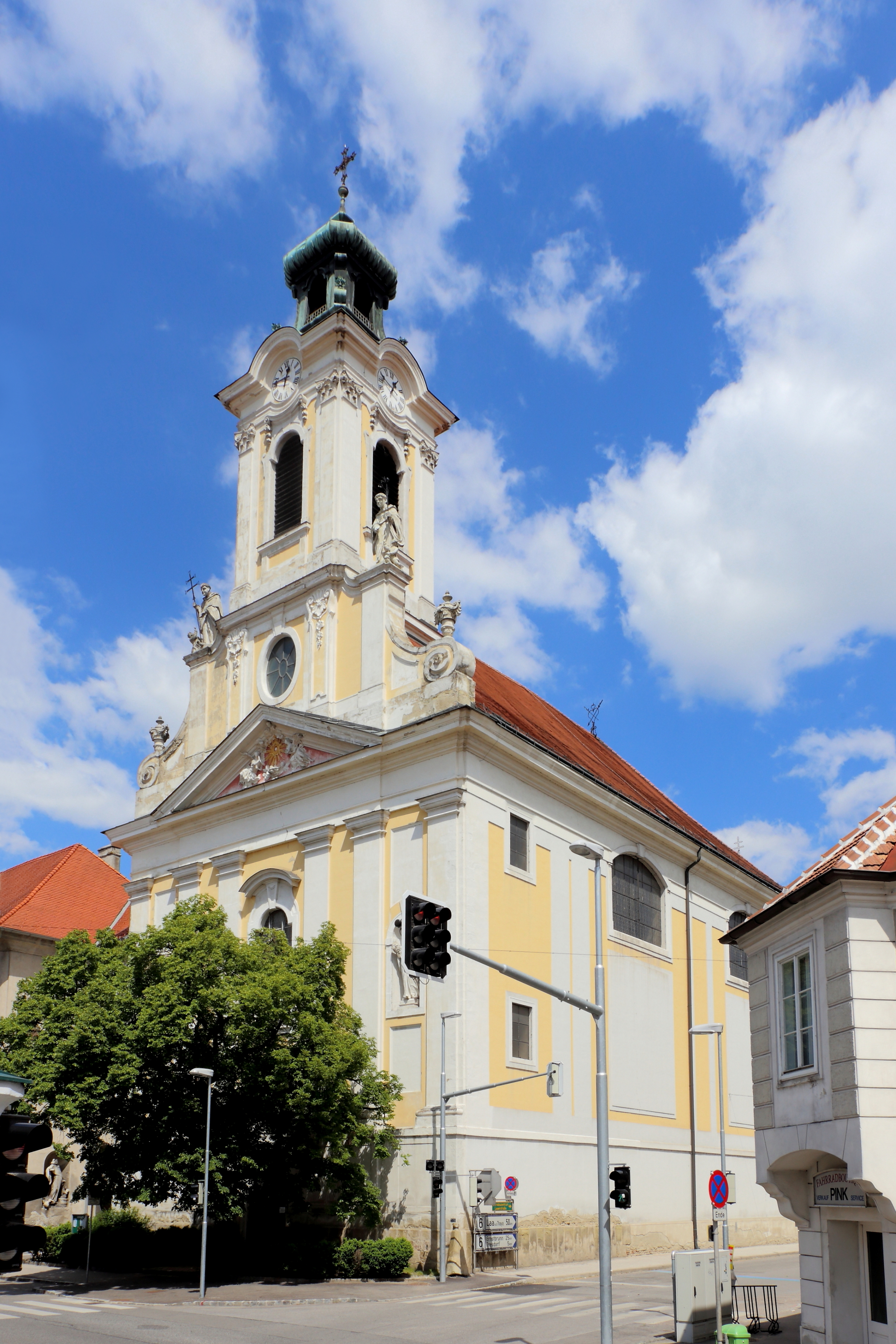 Südostansicht der Augustinerkirche in der niederösterreichischen Bezirkshauptstadt Korneuburg. Die ehemalige Klosterkirche wurde an Stelle einer Vorgängerkirche nach den Plänen des Wiener Baumeisters Johann Enzenhofer (1687-1755) in den Jahren von 1745 bis 1758 errichtet.